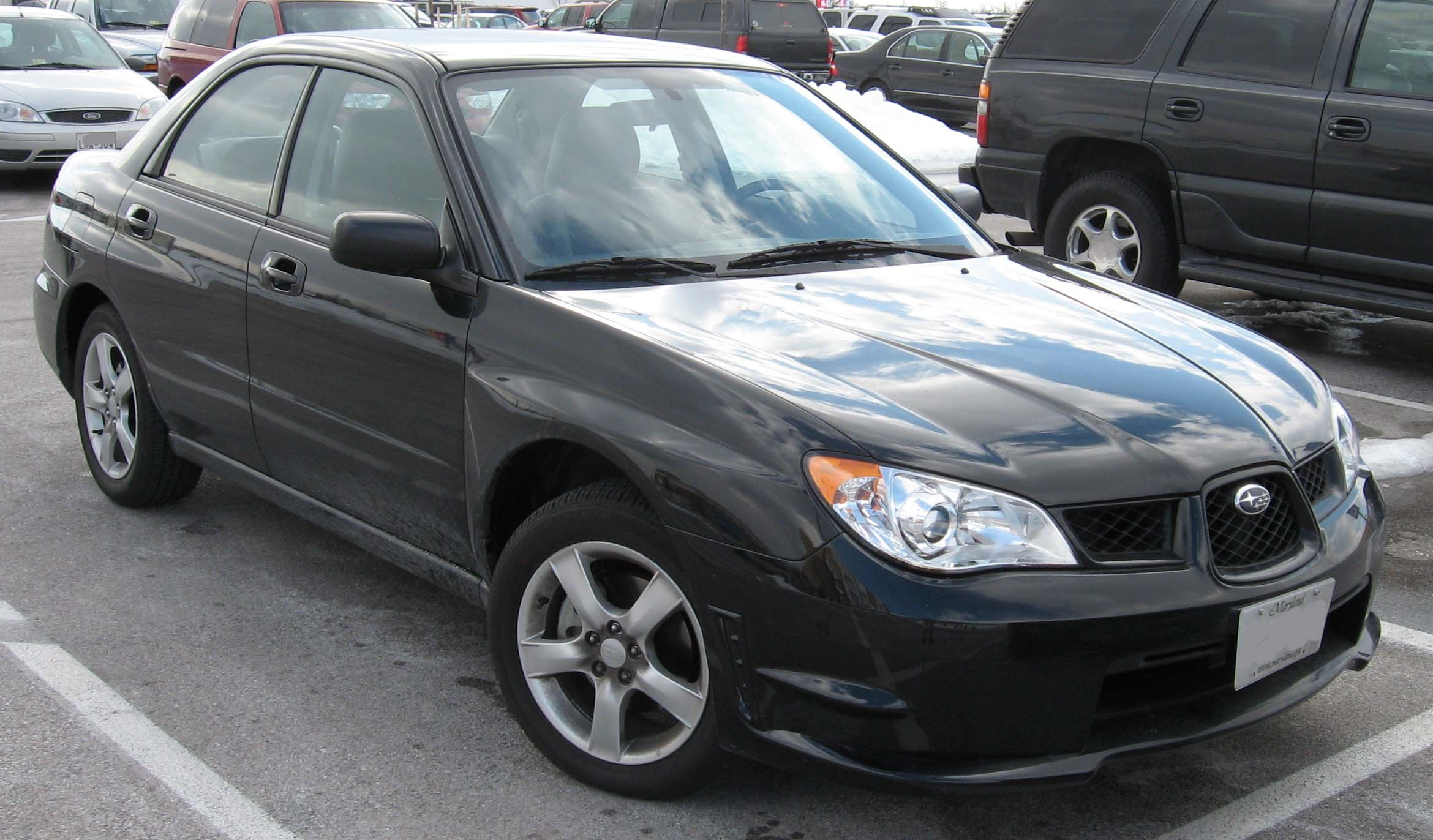 2006-2007 Subaru Impreza photographed in USA.